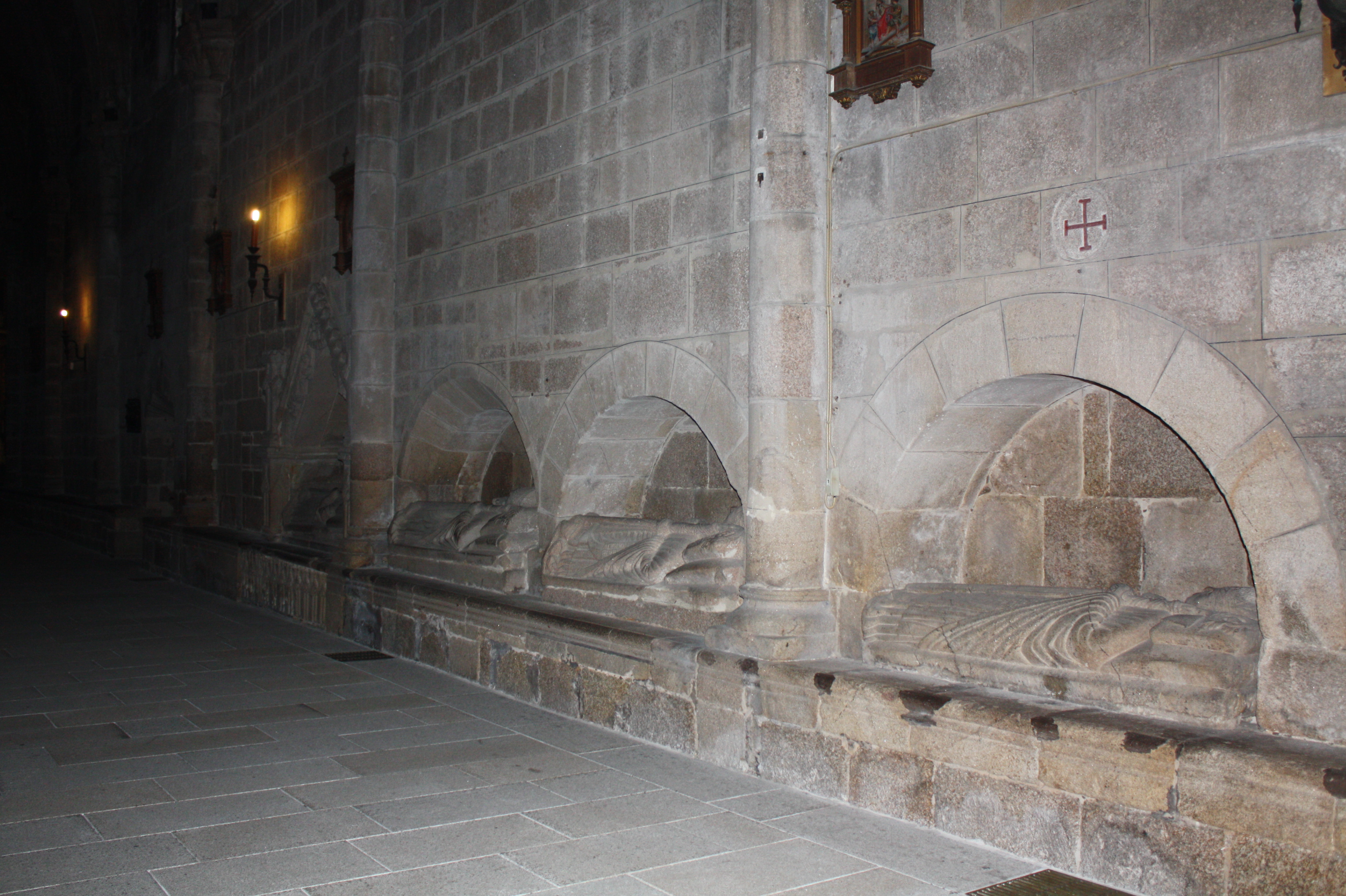 Sartegos na Catedral de Ourense.